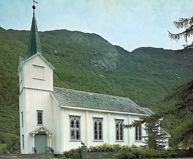 Øksendal kirke